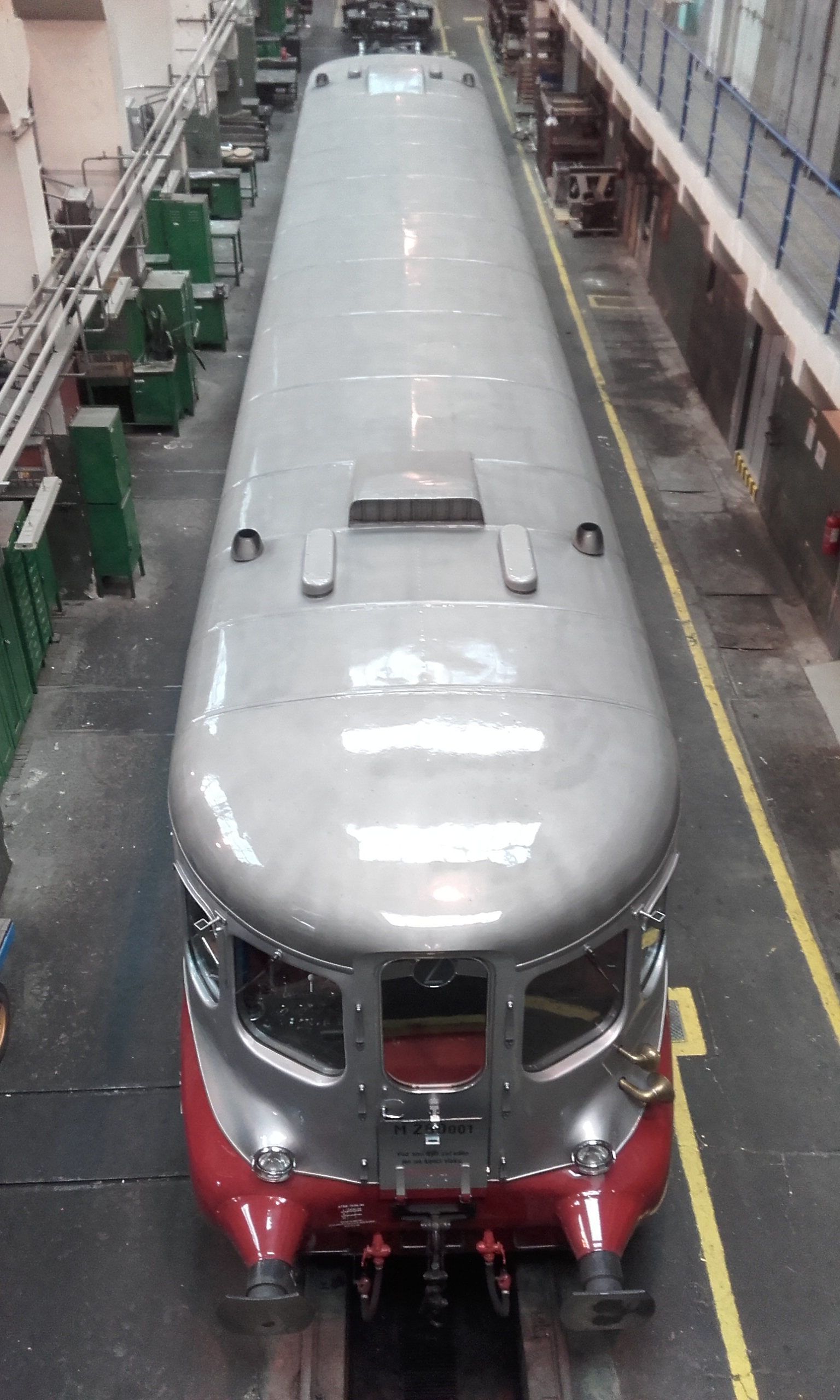 M 260.001 v Libni